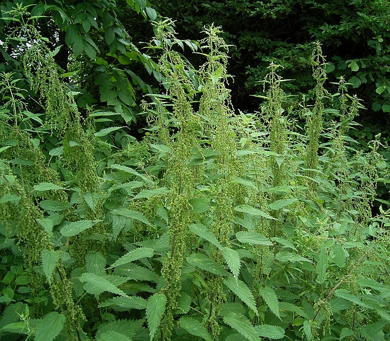 Urtica dioica